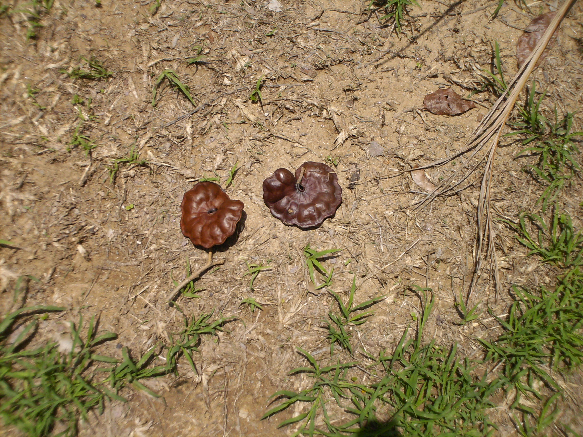 Frutos del carocaro (Enterolobium cyclocarpum)